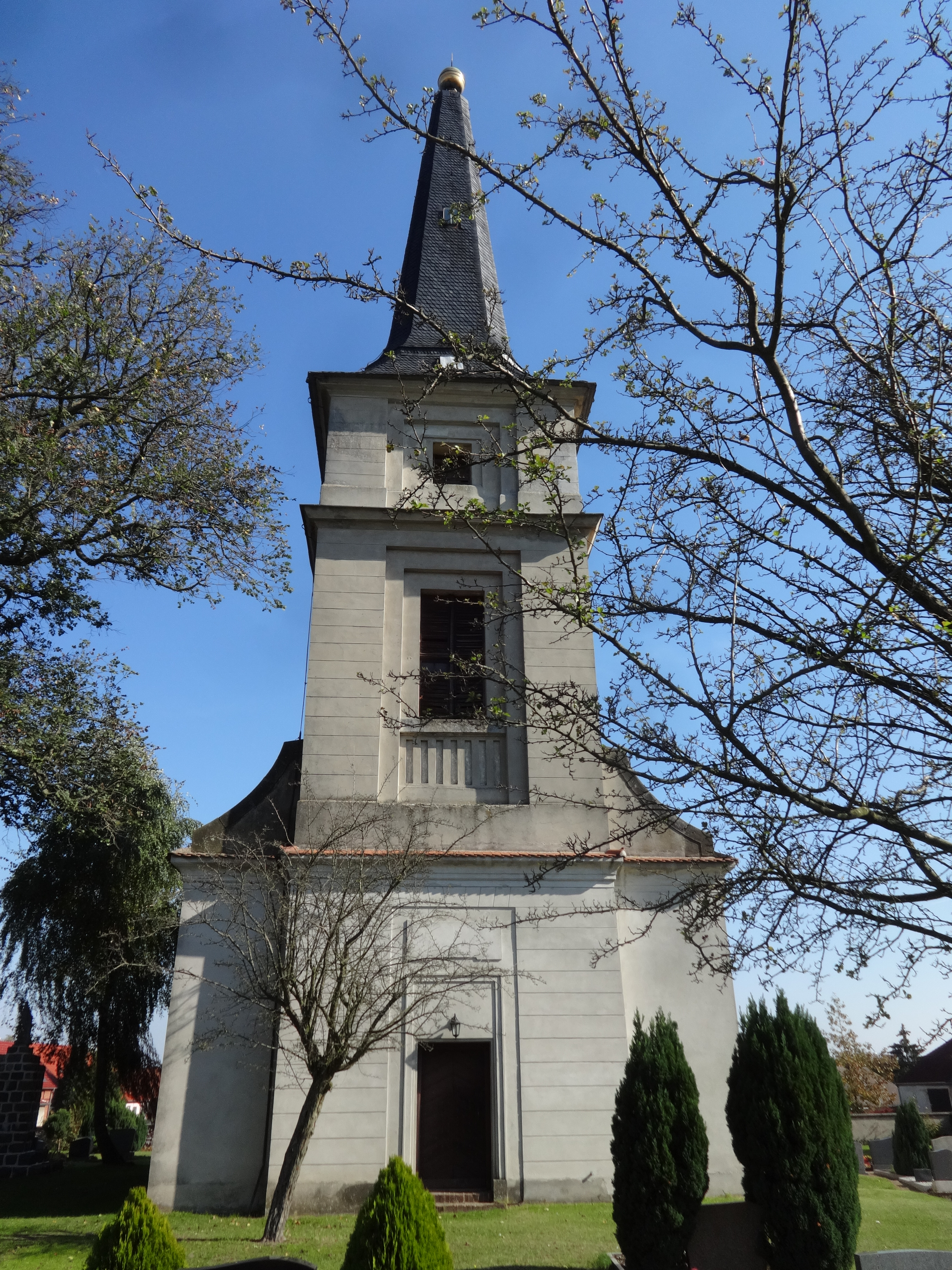 Die Dorfkirche in Groß Rietz in der Gemeinde Rietz-Neuendorf im Landkreis Oder-Spree in Brandenburg entstand im Jahr 1704. In ihrem Innern ist eine barocke Ausstattung aus der Bauzeit.